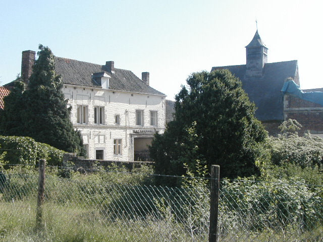 Photo de la maison du jardinier d'Hougoumont vue de l'ancien jardin